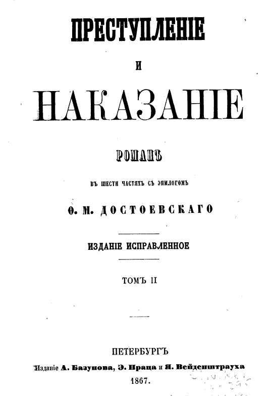 Обложка романа "Преступление и наказание"